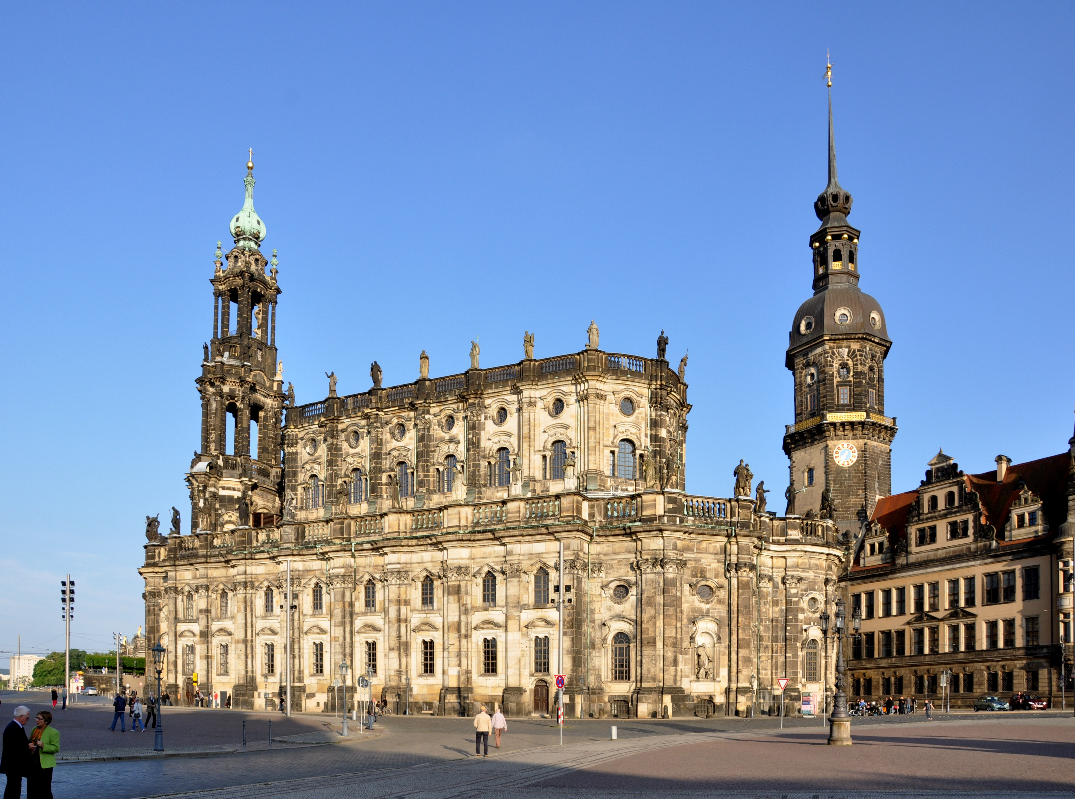 Dresden, Hofkirche